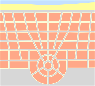 Modèle mixte (radioconcentrique/damier) en urbanisme